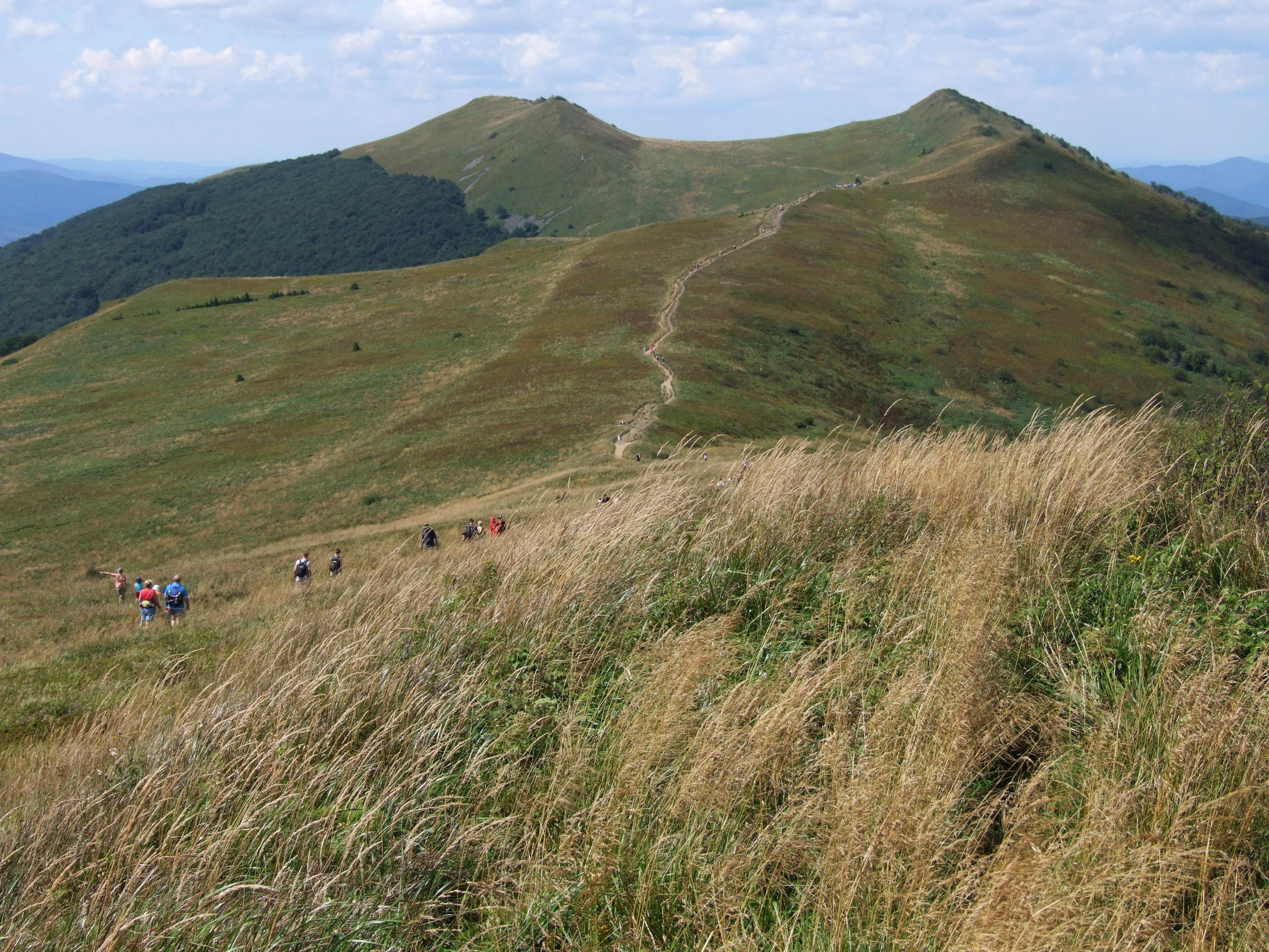 Połonina Wetlińska, odcinek: Hasiakowa Skała-Roh